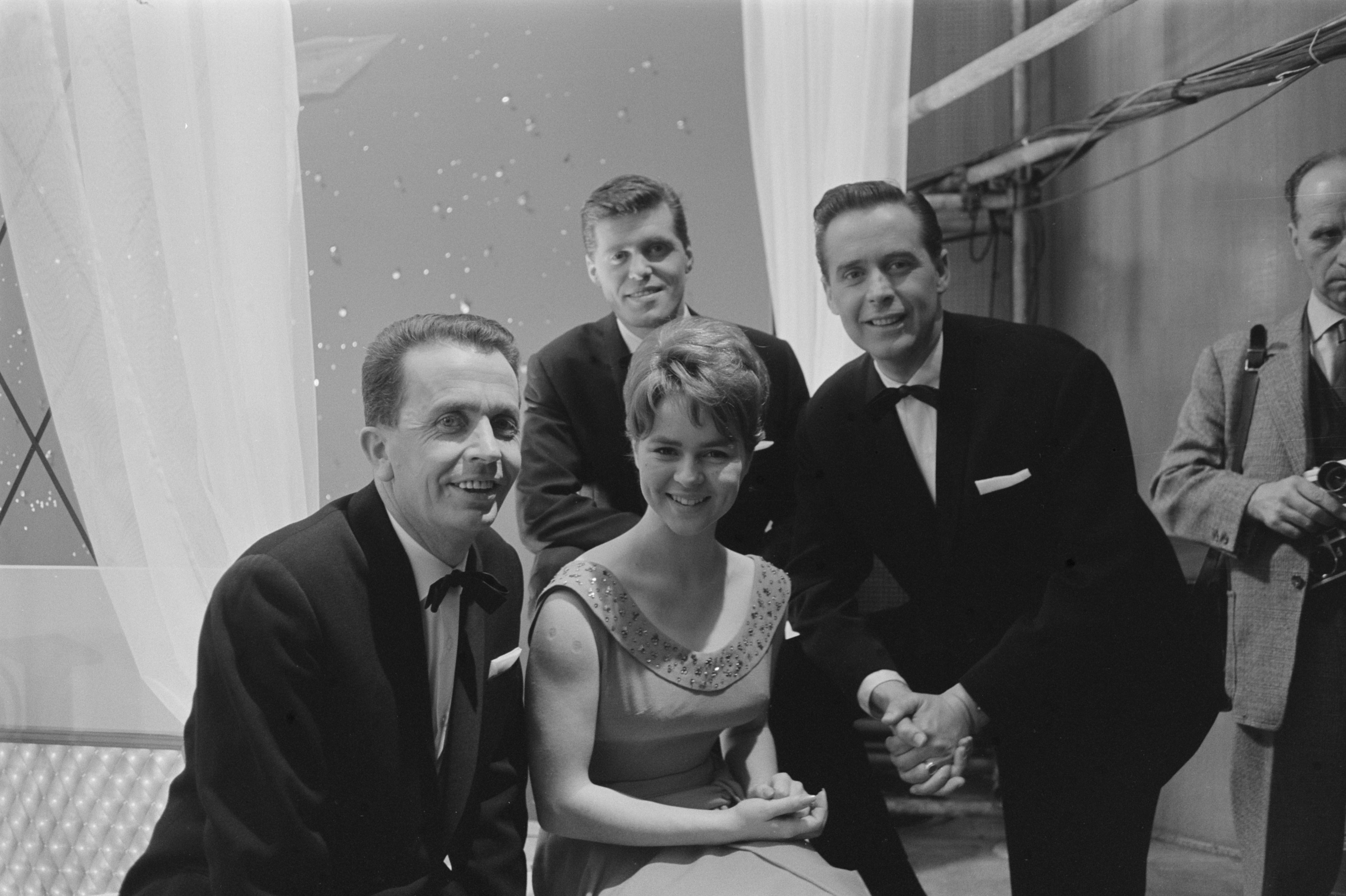 Collectie / Archief : Fotocollectie Anefo Reportage / Serie : [ onbekend ] Beschrijving : Eurovisie Songfestival 1962 te Luxemburg, Spelbrekers met Conny Froboes, op de achtergrond Francois Deguelt Datum : 18 maart 1962 Locatie : Luxemburg Trefwoorden : artiesten, songfestivals Persoonsnaam : Deguelt Francois, Froboes Conny Instellingsnaam : Spelbrekers Fotograaf : Pot, Harry / Anefo Auteursrechthebbende : Nationaal Archief Materiaalsoort : Negatief (zwart/wit) Nummer archiefinventaris : bekijk toegang 2.24.01.05 Bestanddeelnummer : 913-6616 Reacties Geplaatst door Maaike op 19 juli 2012 - 20:51. Persoonsnamen: Theo Rekkers en Huug Kok (De Spelbrekers)